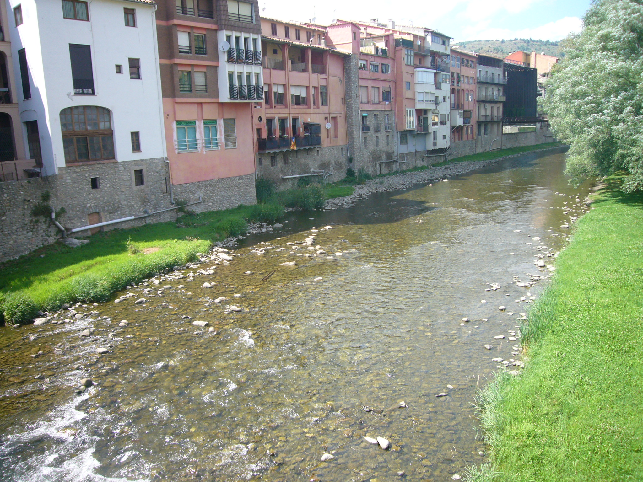 Riu Ter i cases vist des del pont de Casino (Ripoll).